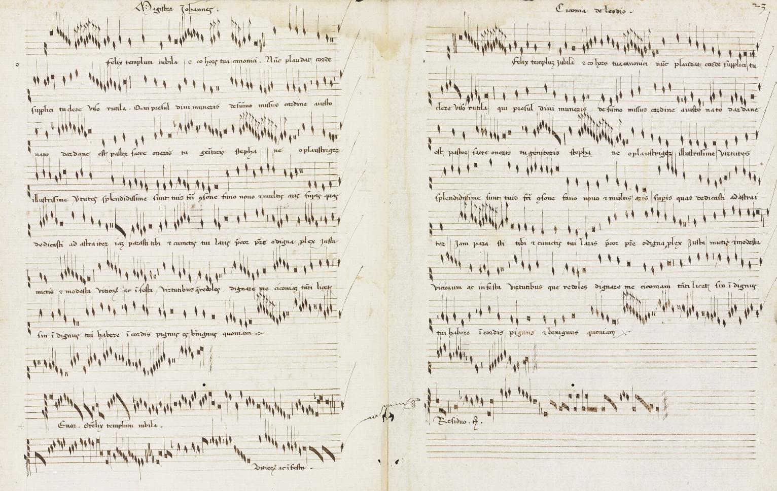 Oxford, Bodleian Library, MS Canonici Miscellaneous 213